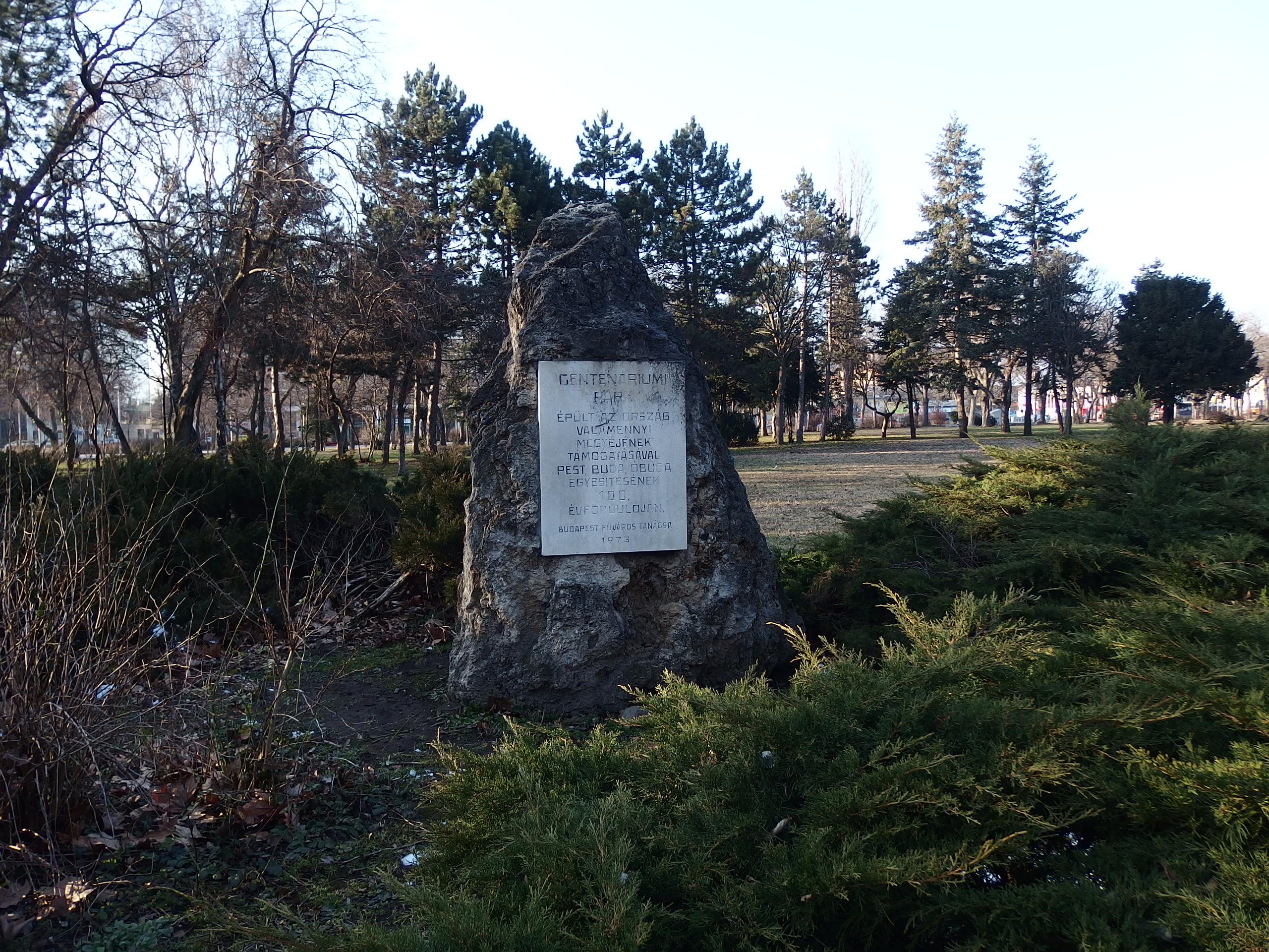 Népliget, Centenáriumi park (Budapest)